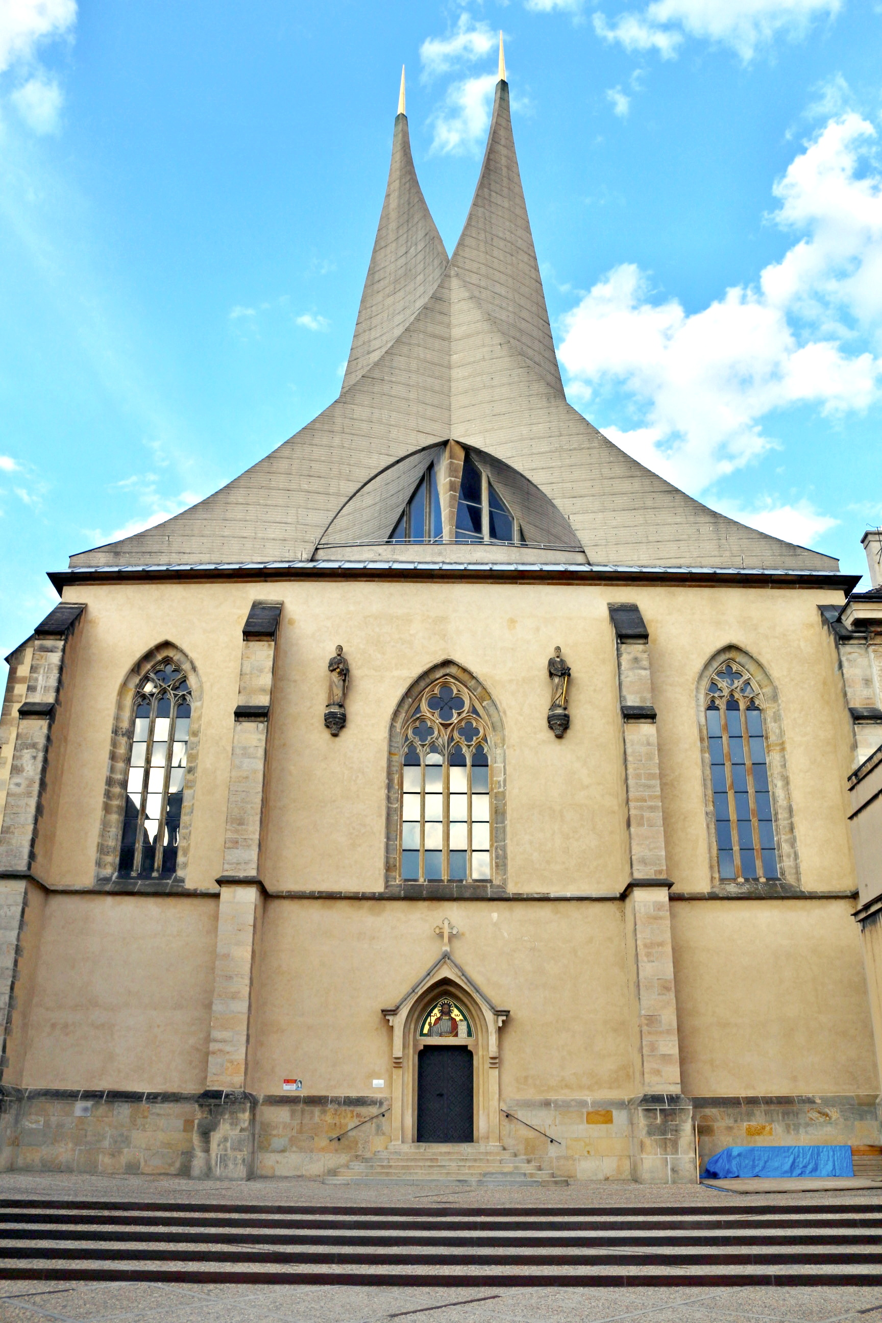 Kostel Panny Marie na Slovanech